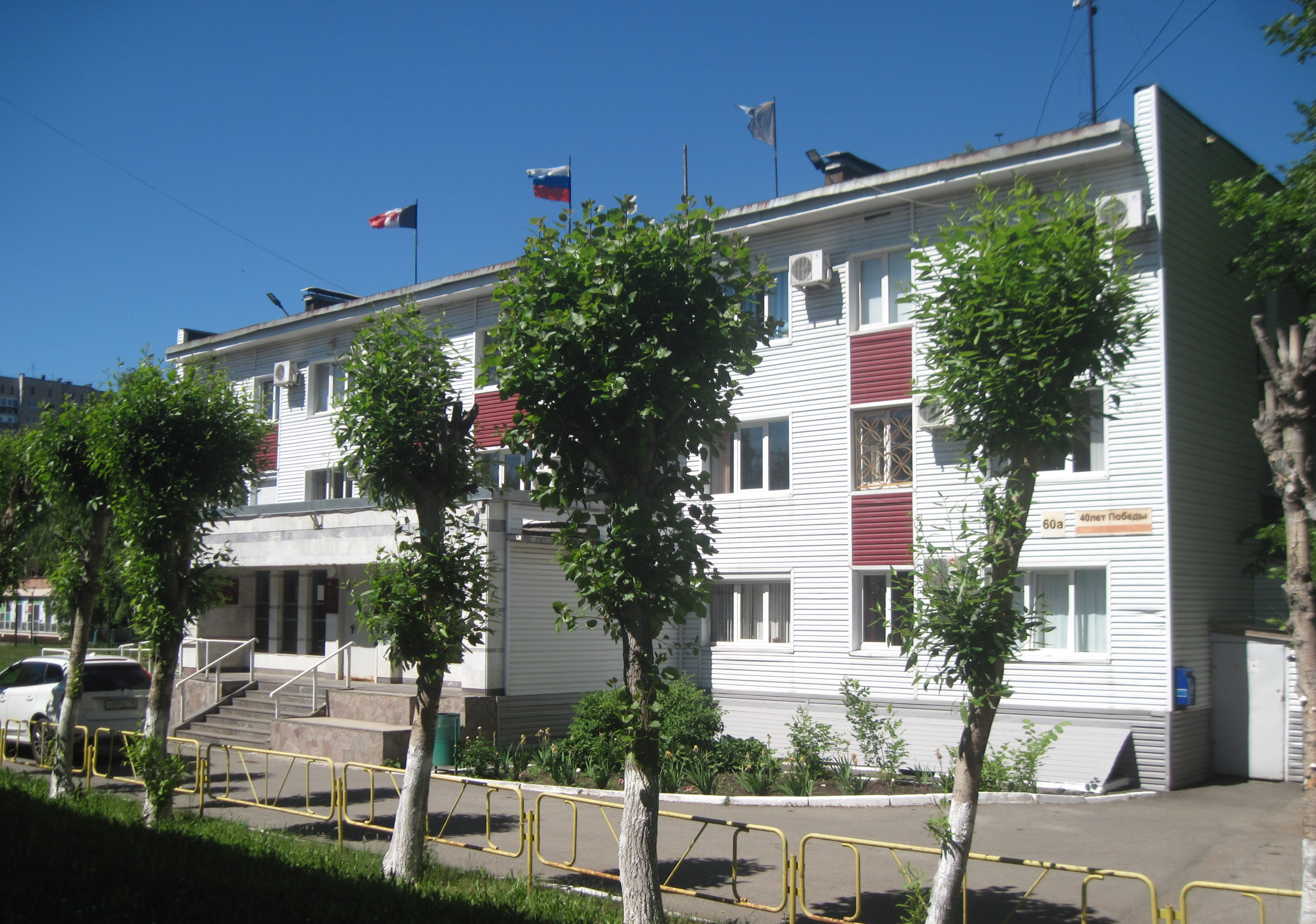 Ижевск,улица 40 лет Победы,60А